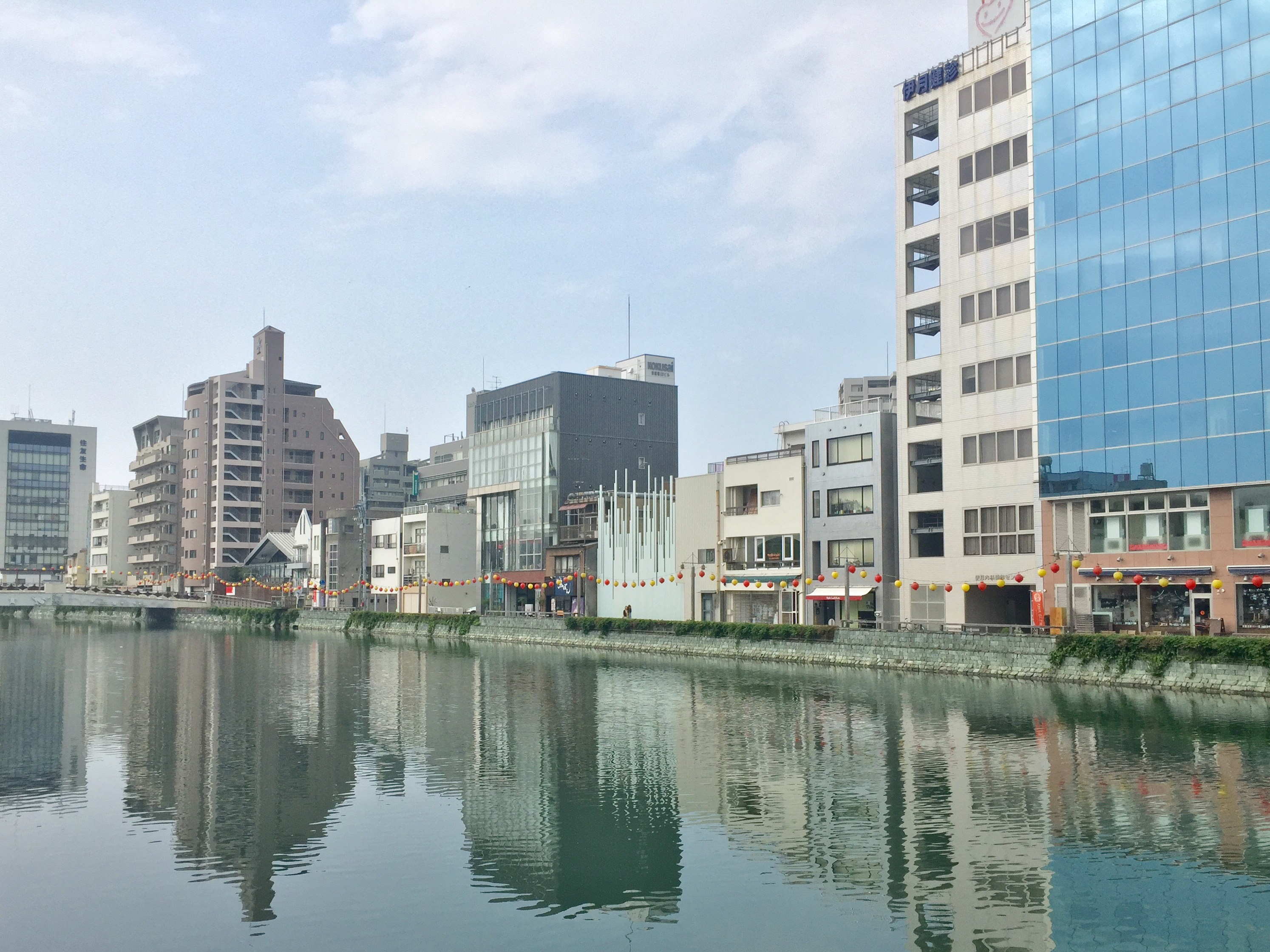 徳島県徳島市の新町川沿いに整備されたしんまちボードウォーク。画像中心部は国際東船場113ビル。